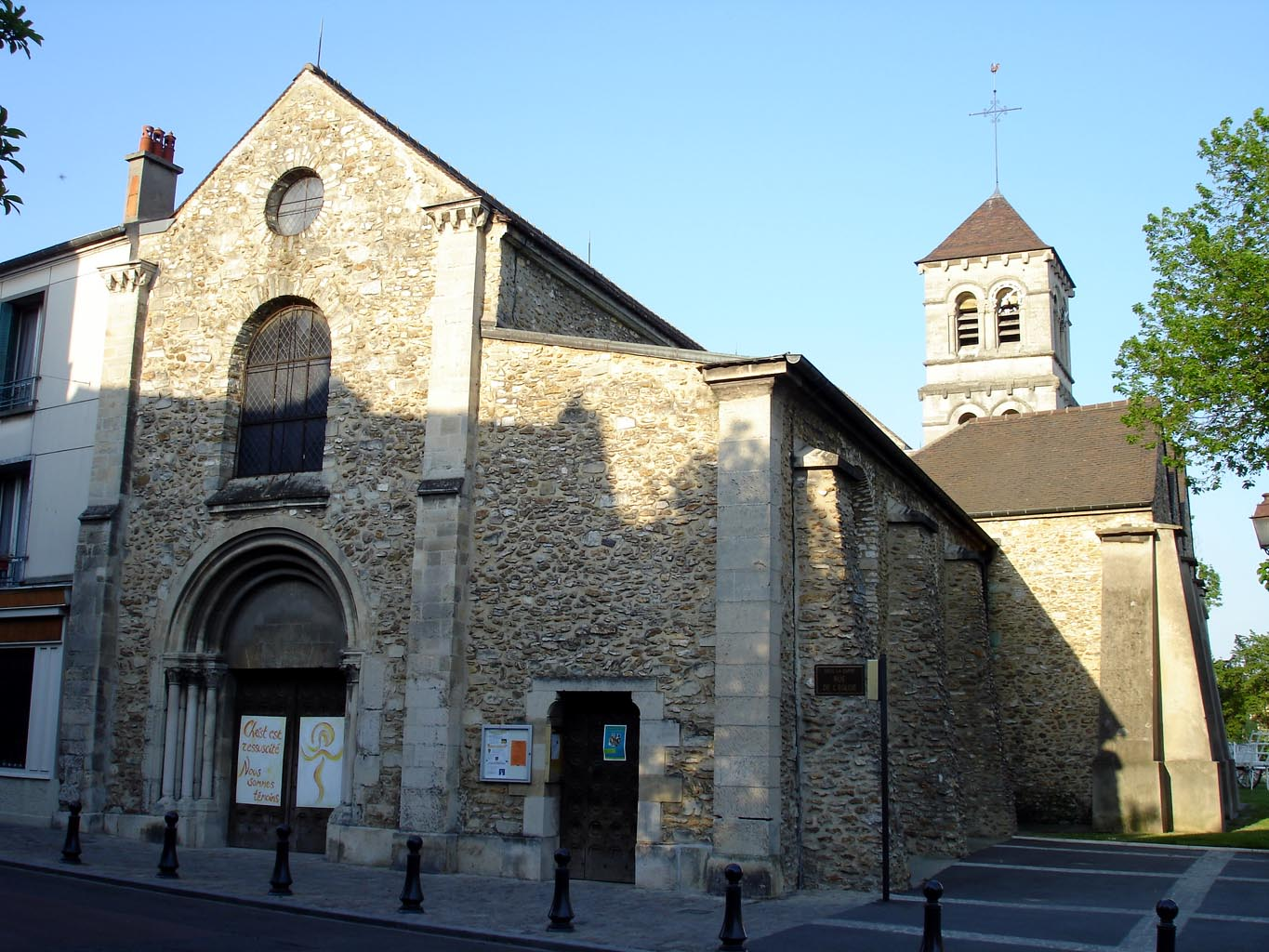 Façade de l'église de Deuil-la-Barre (Val-d'Oise), France